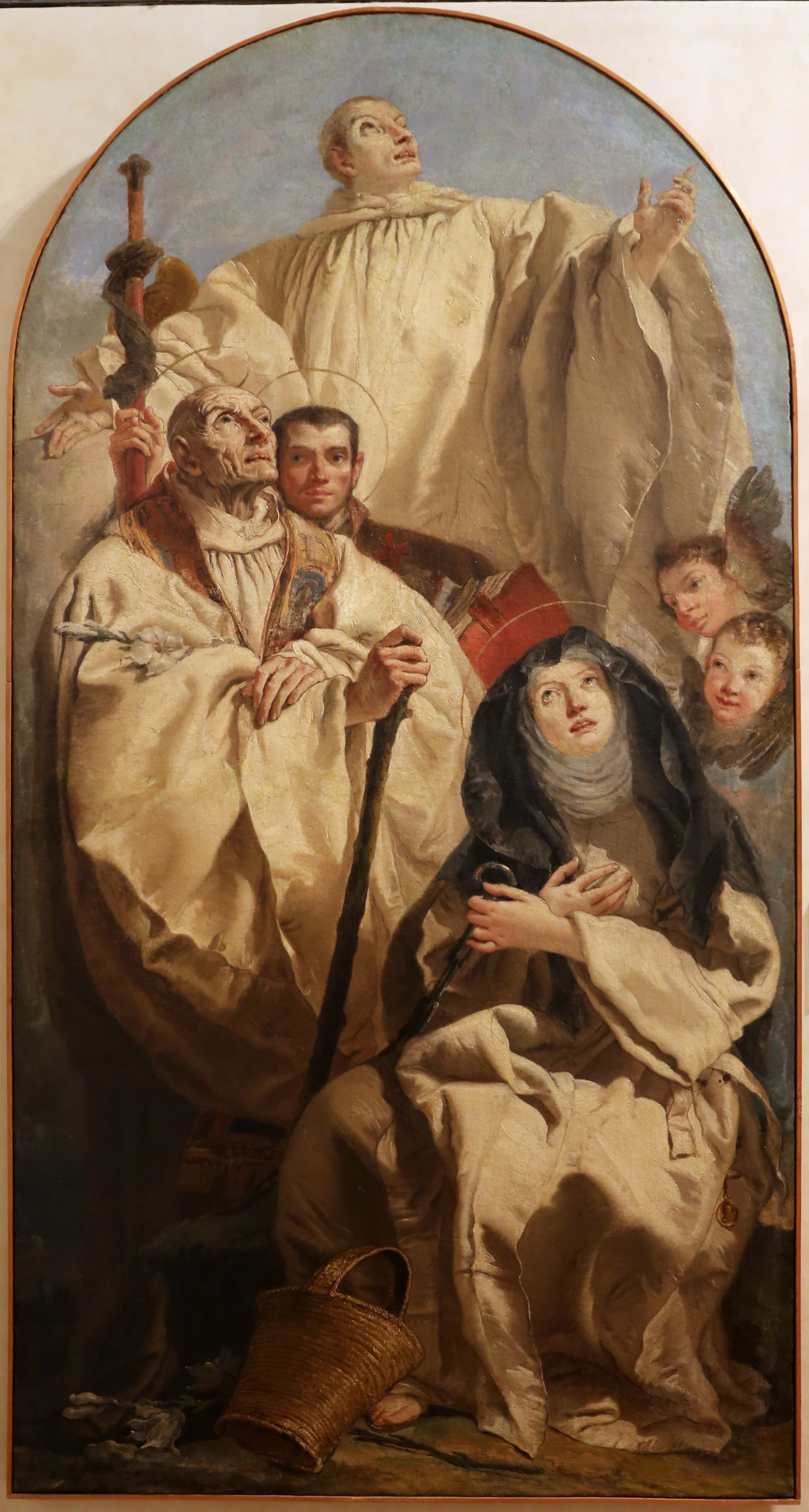 Museo di Castelvecchio This is a photo of a monument which is part of cultural heritage of Italy.